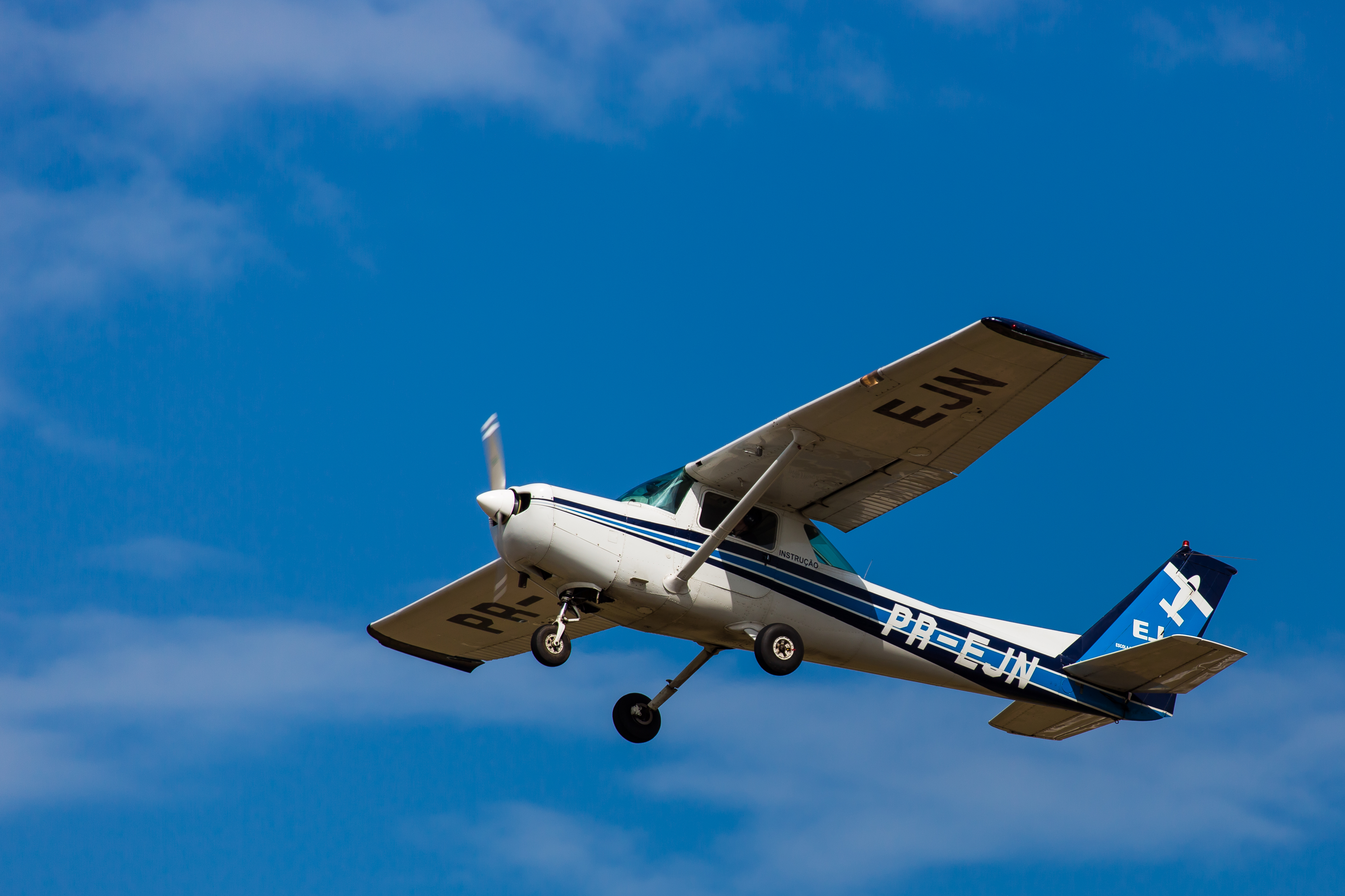 Fabricante: CESSNA AIRCRAFT Modelo: 152 Número de Série: 15285911 Tipo ICAO : C152 Tipo de Habilitação para Pilotos: MNTE Classe da Aeronave: POUSO CONVENCIONAL 1 MOTOR CONVENCIONAL Peso Máximo de Decolagem: 759 - Kg Número Máximo de Passageiros: 001